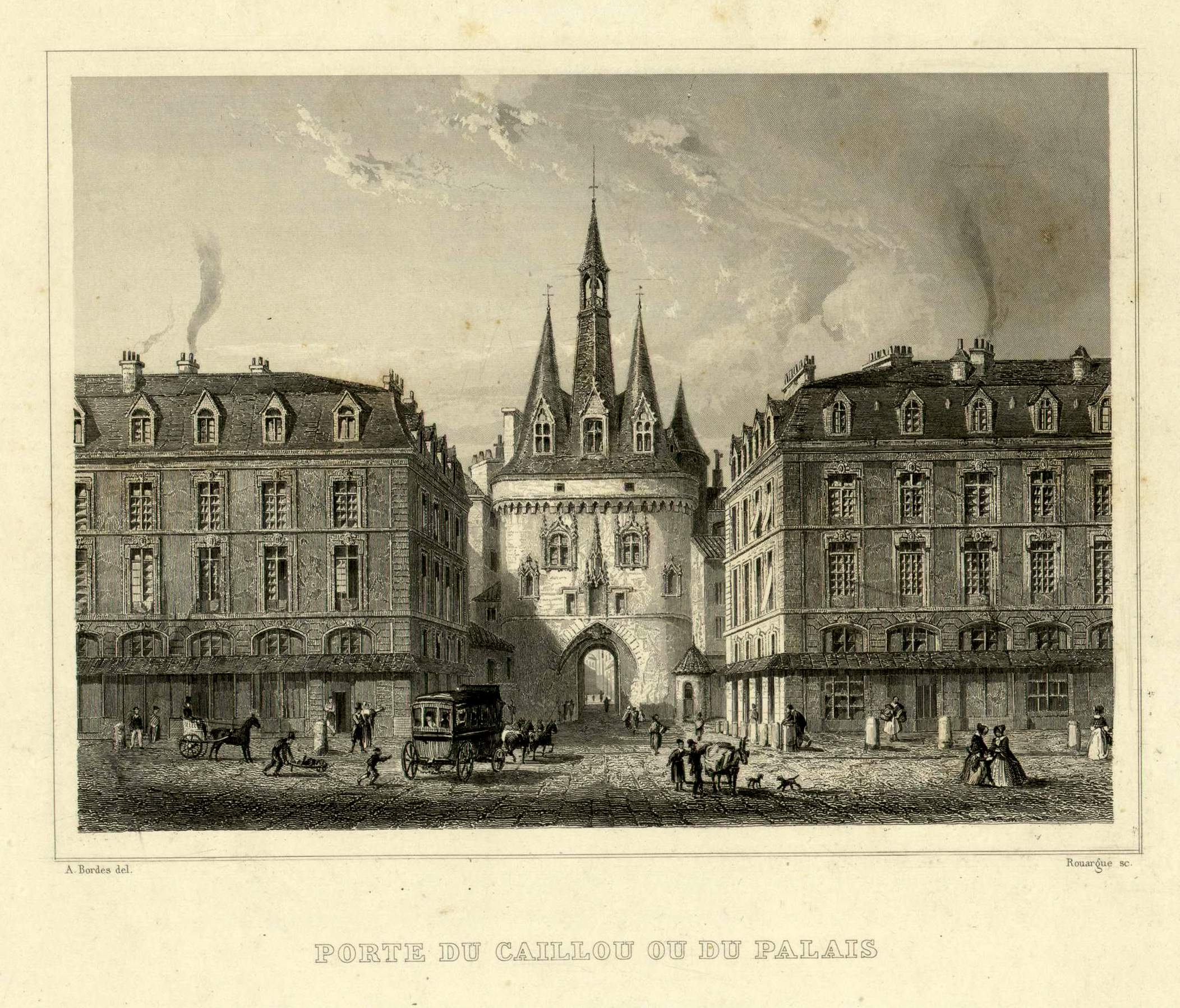 Porte du Callou ou du palais